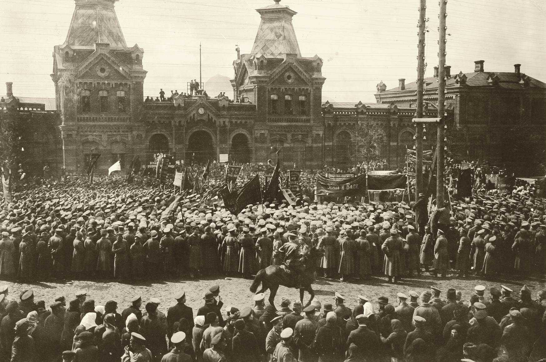 Беларуская (тарашкевіца): Менск (Miensk), Віленскі (Vilenski) вакзал. Маніфэстацыя